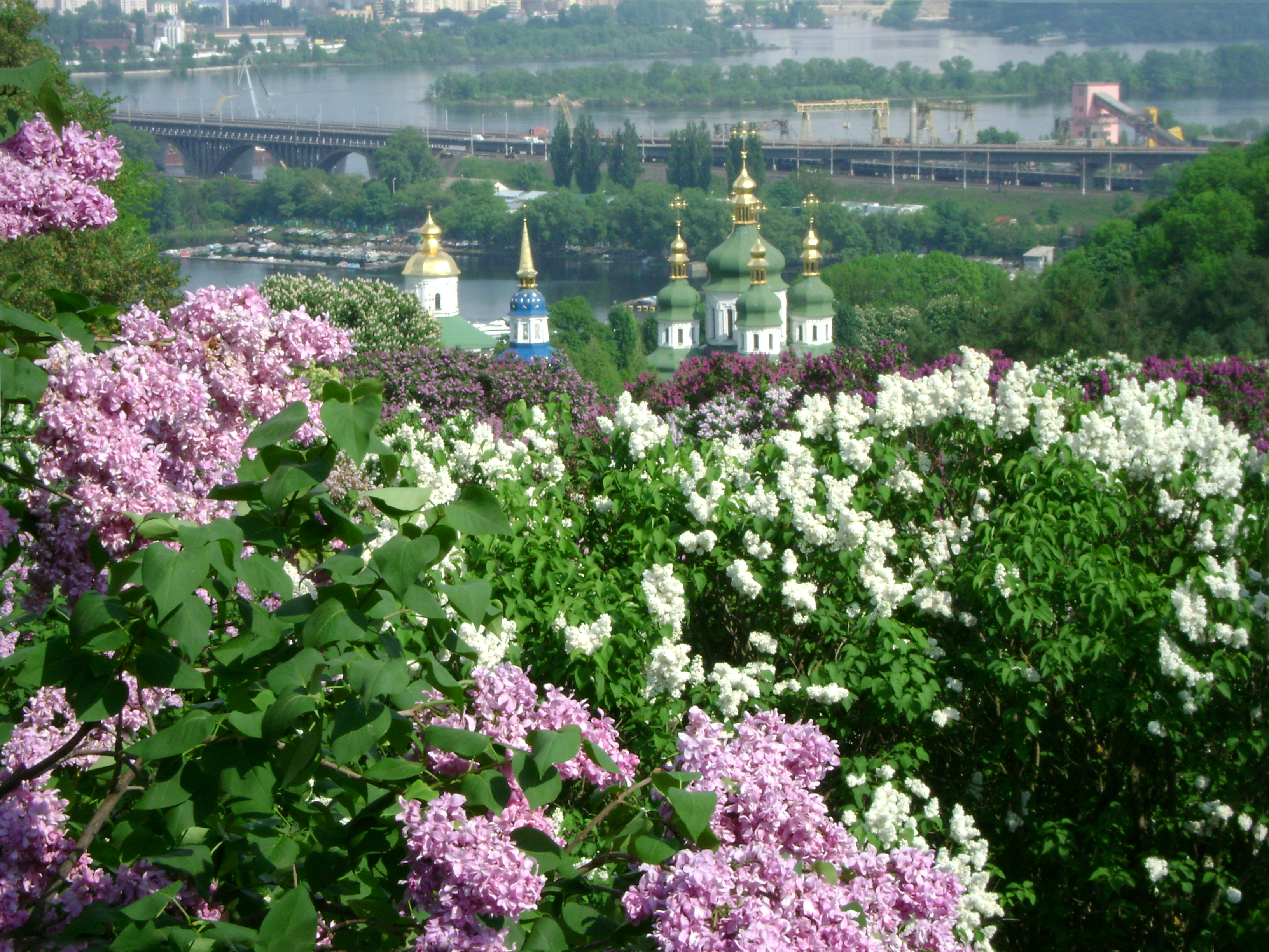 Національний ботанічний сад ім. М.Гришка, Печерський район